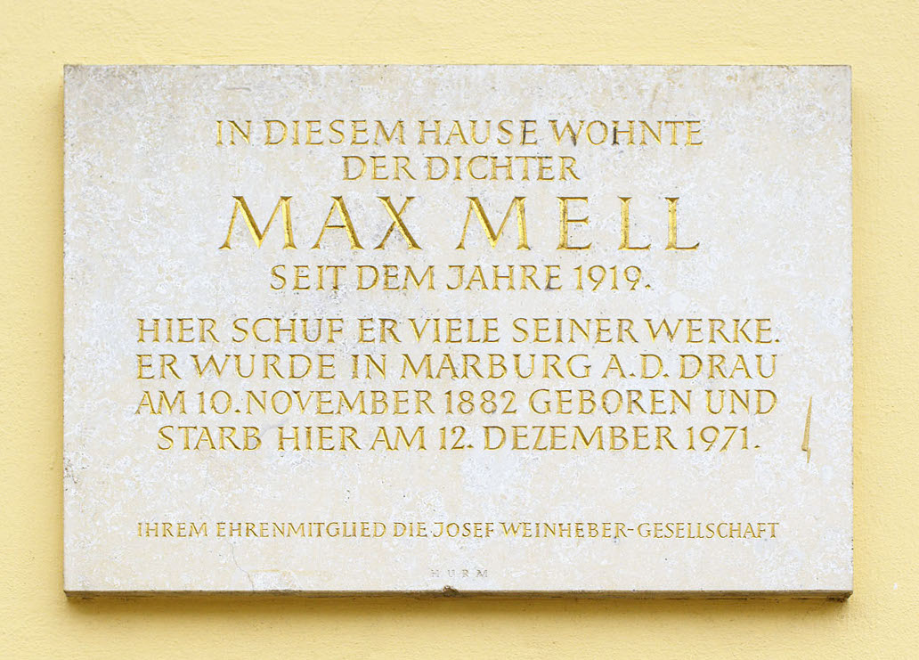 Max Mell Gedenktafel an seinem Sterbehaus in Wien 13, Auhofstrasse 244.